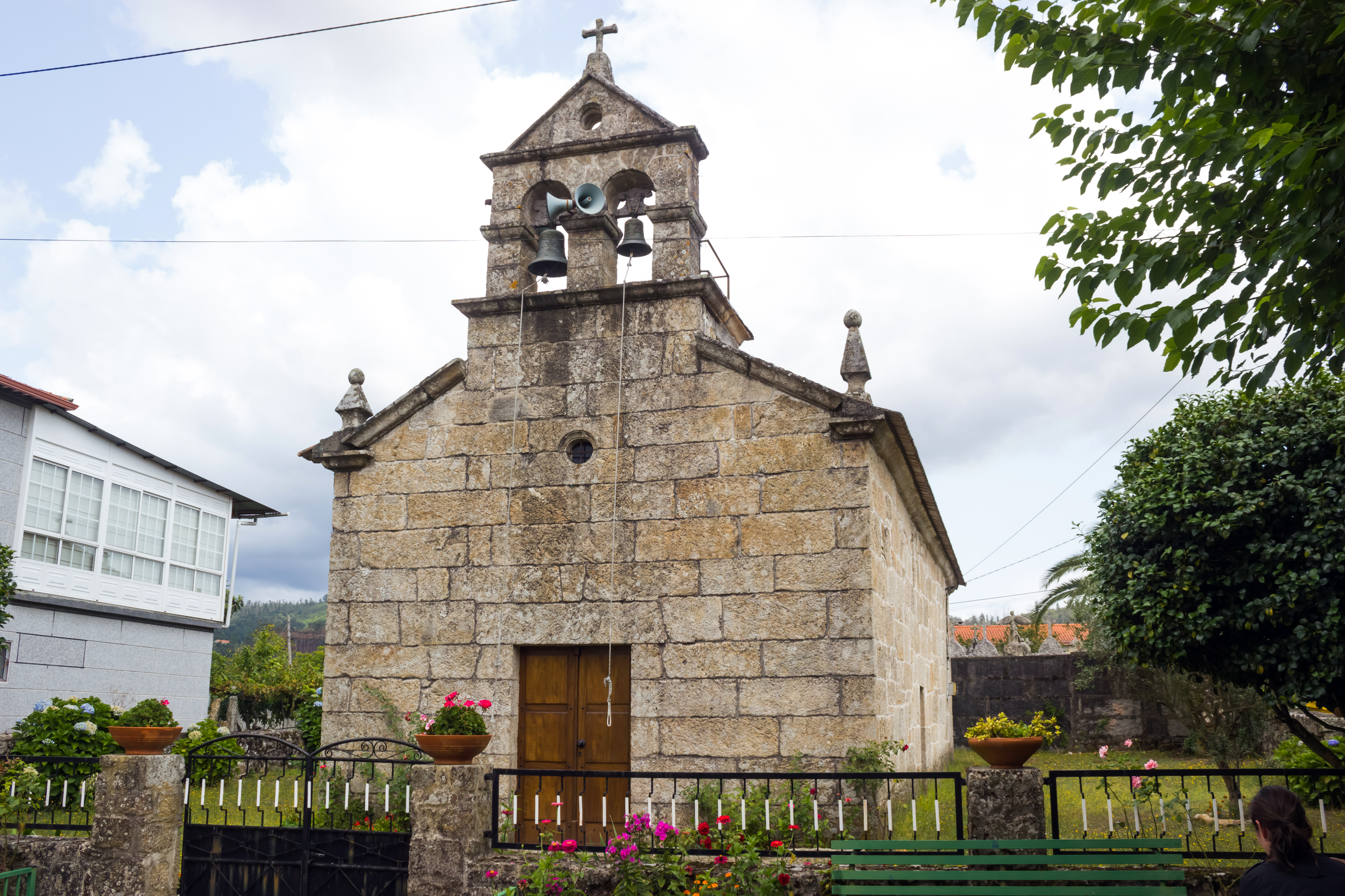 Igrexa de Santa María de Liñares, no concello das Neves.